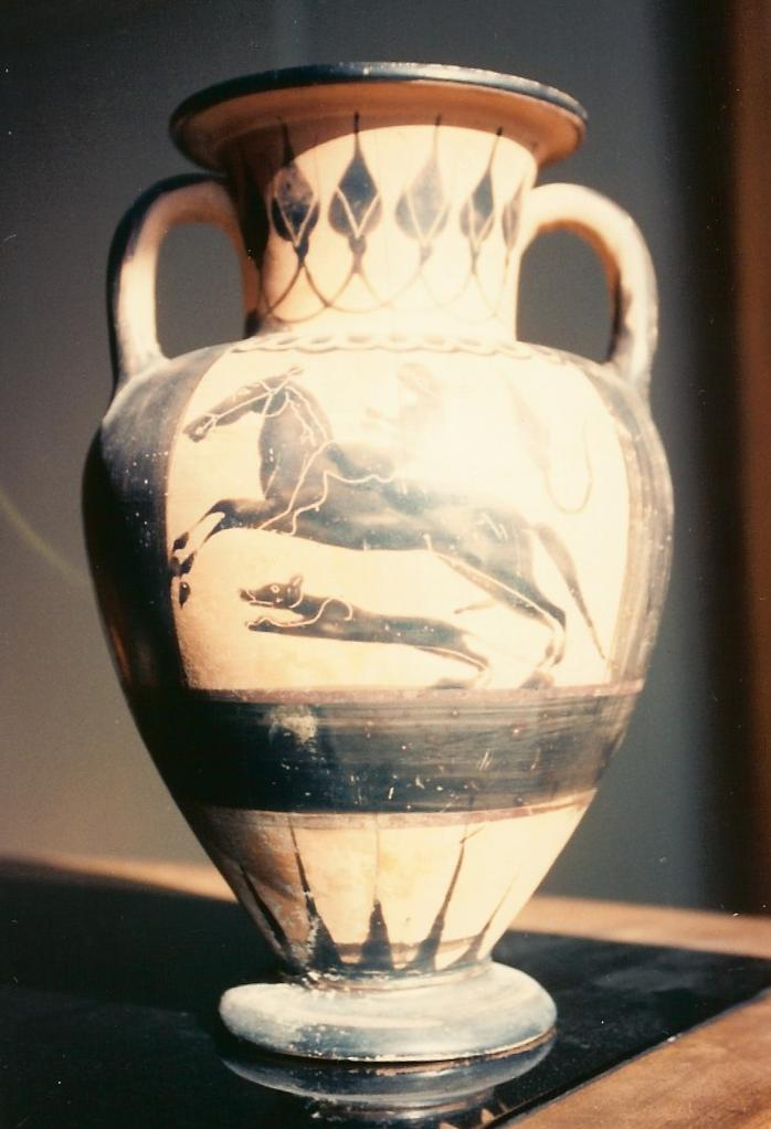 Metauros, anfora a figure nere con cavaliere e cane